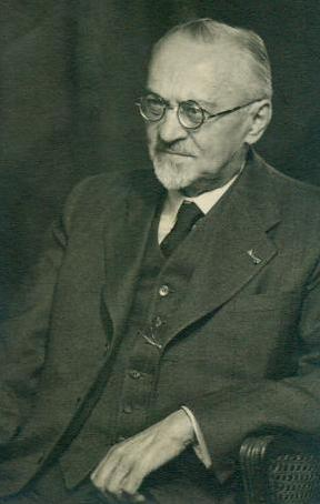 Journalist, Schriftsteller, Verleger, Mundart- und Heimatdichter